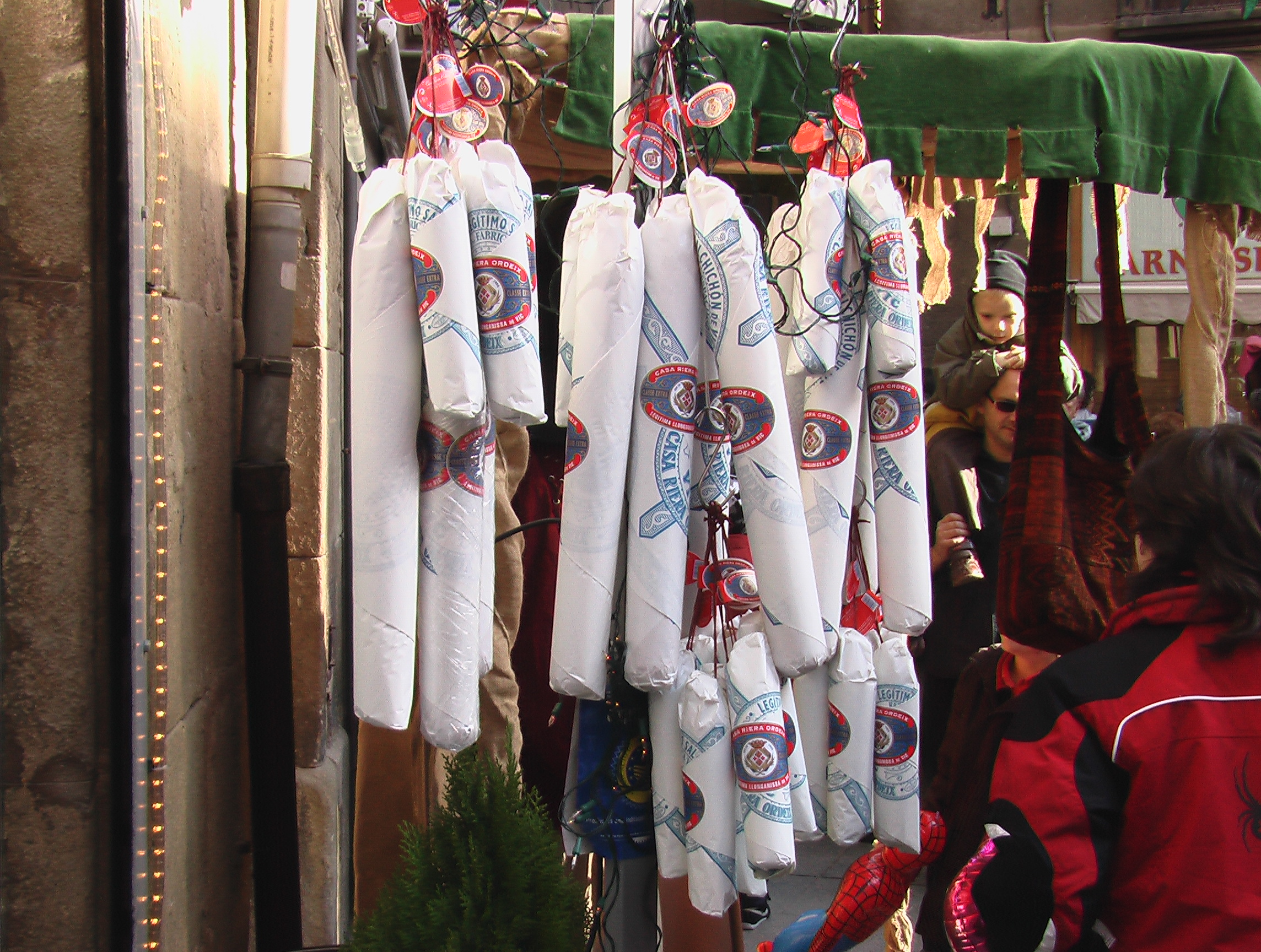 Foto de Llonganissa